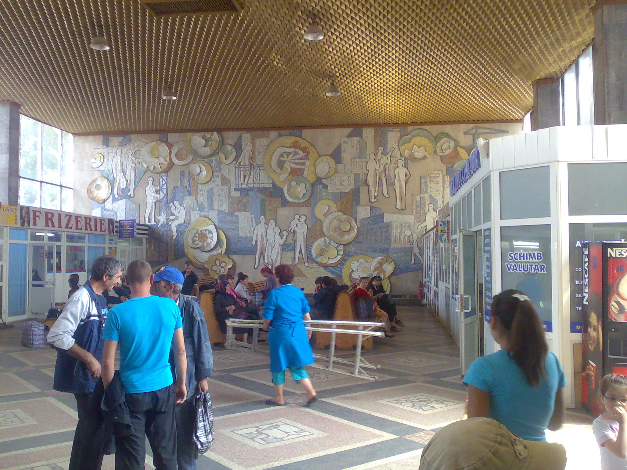 Зал ожидания Центрального автовокзала Кишинёва